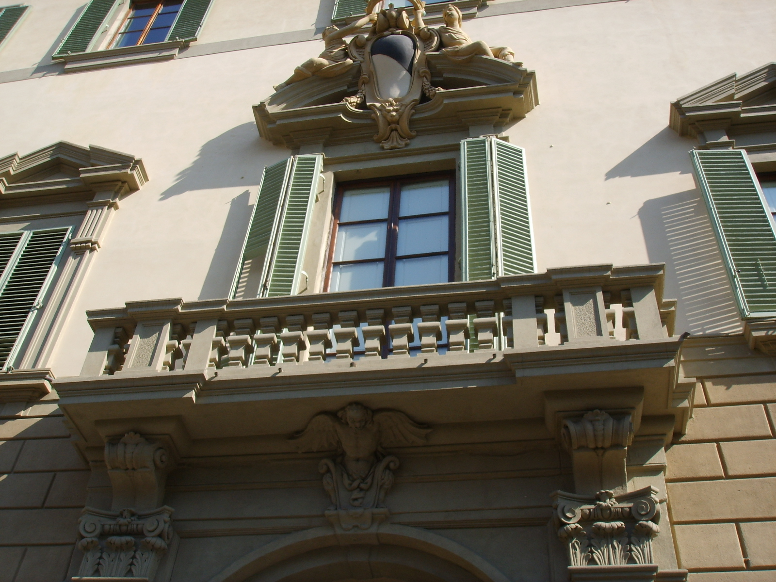 Palazzo di Gino Capponi in Florence